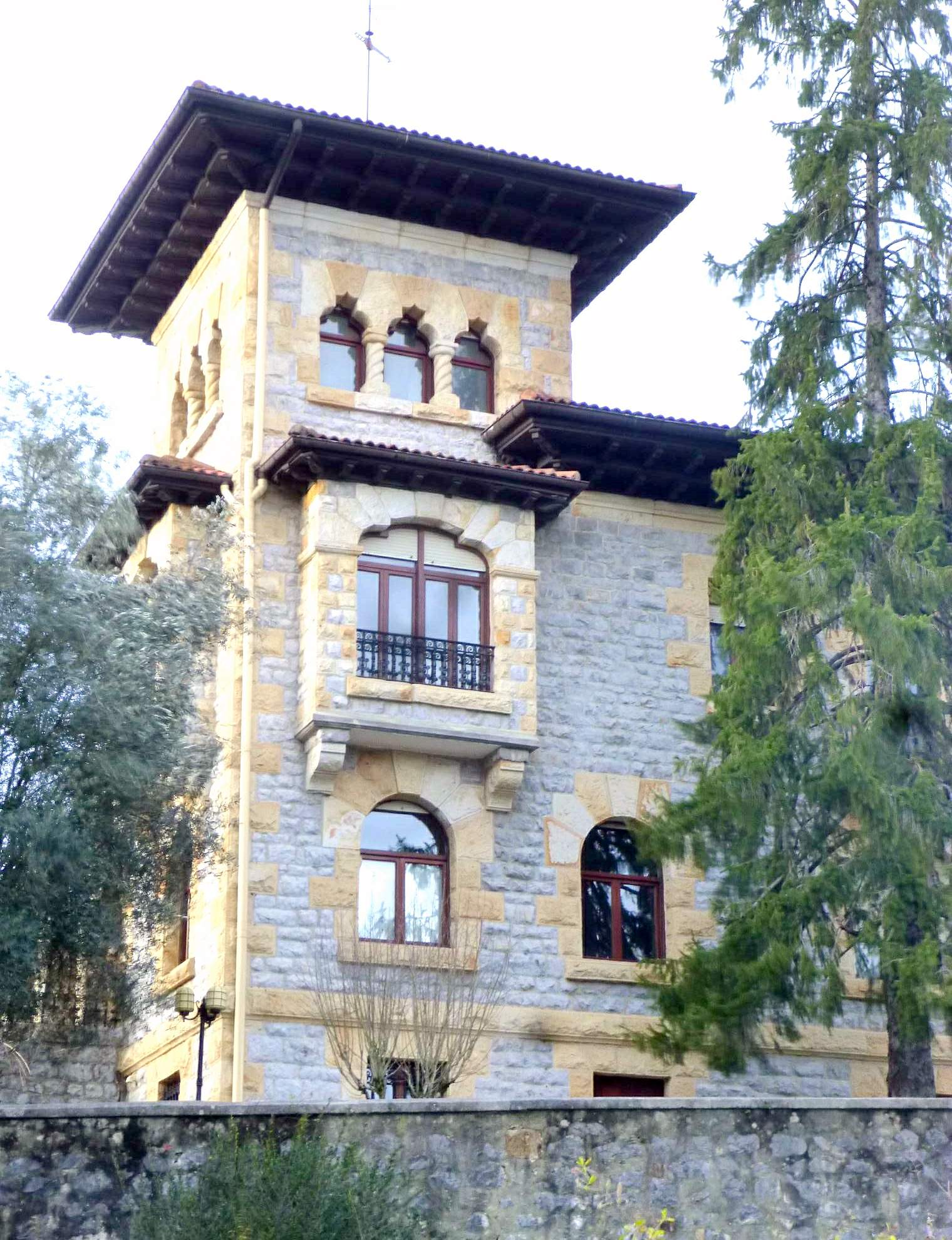 Igorre / Yurre (Vizcaya)